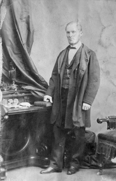 Photographie de John Molson l'aîné (1787-1860). Photo retouchée en 1867 par William Notman. John Molson (Montréal, 3 octobre 1787 - 12 juillet 1860), fils aîné de John Molson l'ancien, était un homme d'affaires, officier de milice, fonctionnaire, juge de paix et homme politique. Il travailla avec son père dans la brasserie.